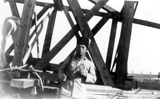 1936, הנוטר מתתיהו שלם בעלייה לקרקע של תל עמל ;30 - בית אלפא